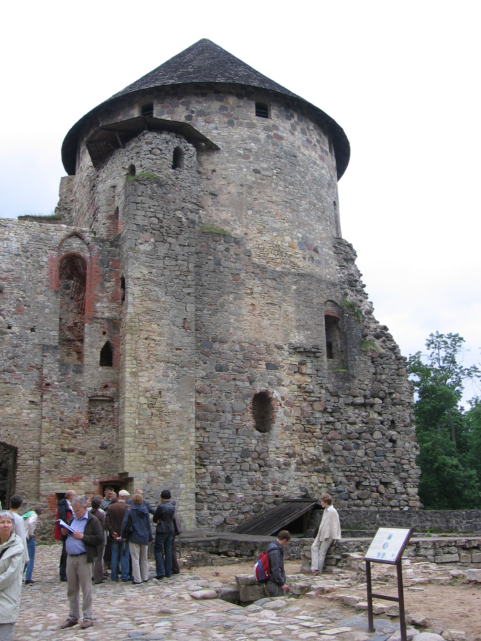 Võnnu ordulinnuse elutorn siseõue pooltt